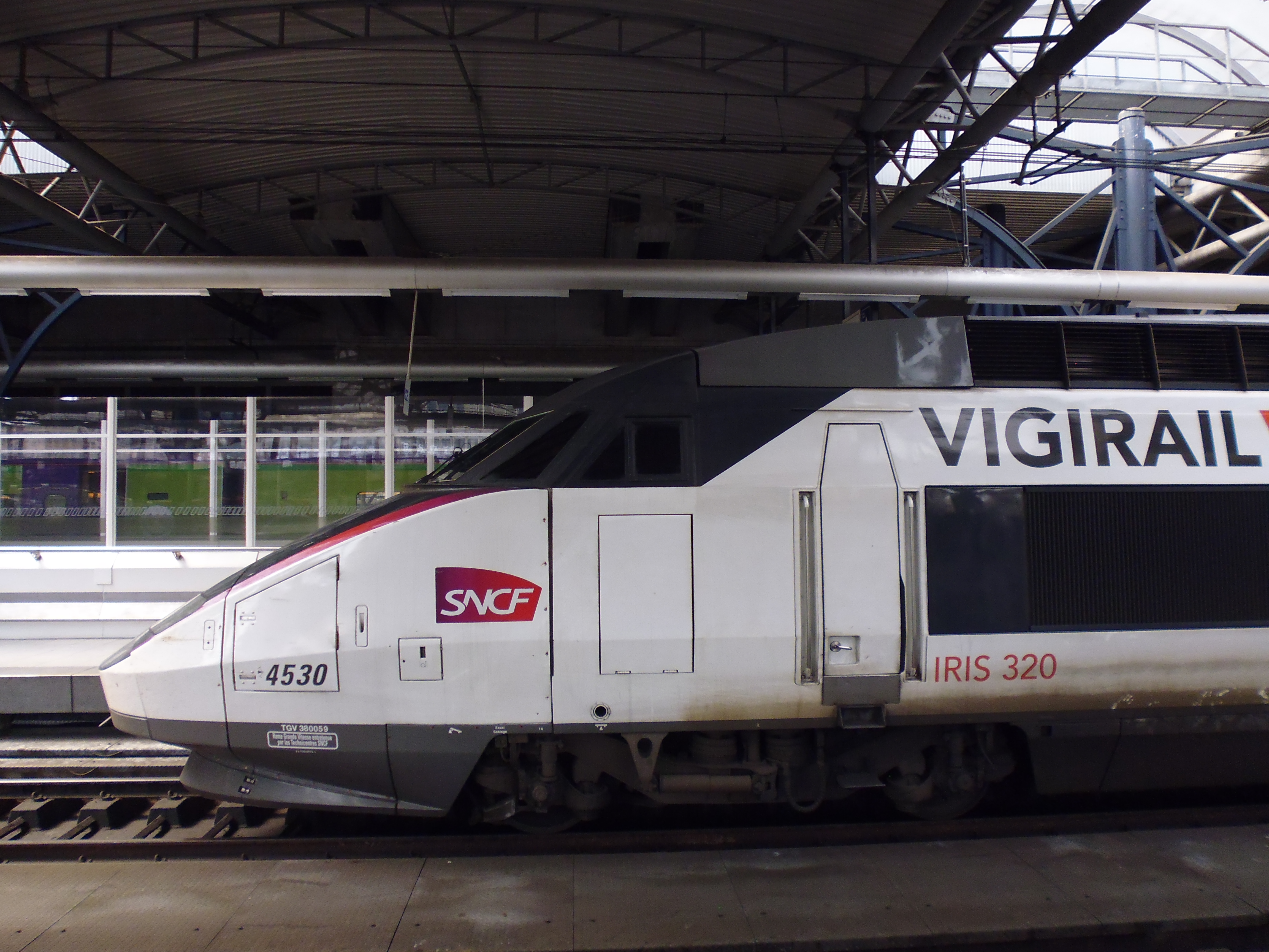 motrice M1 vue de profil.